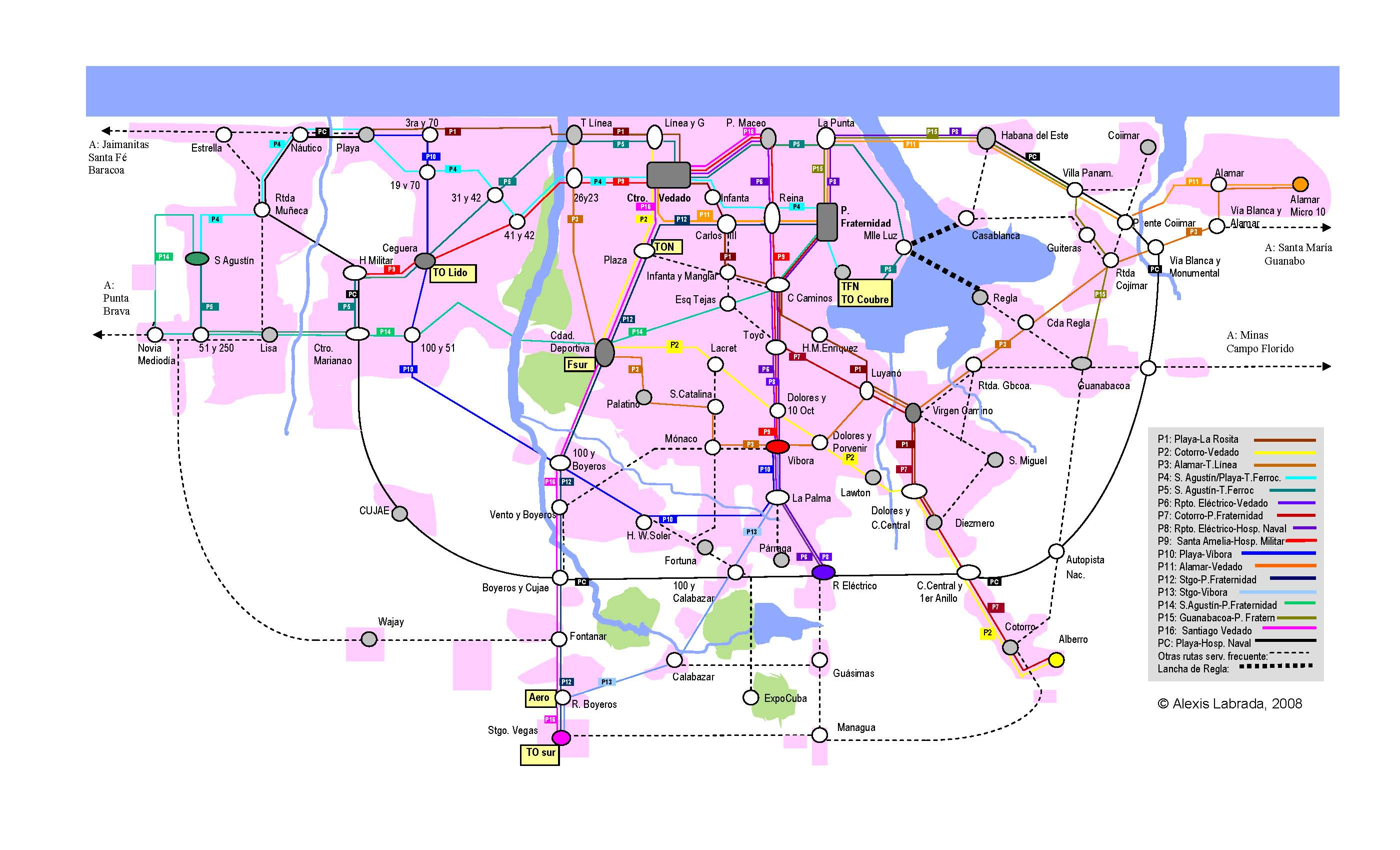 Mapa de rutas principales del transporte público en La Habana